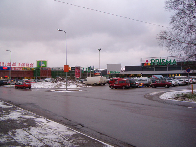 Mustika keskus. Laki I kvartal (Kadaka asum). Tallinn